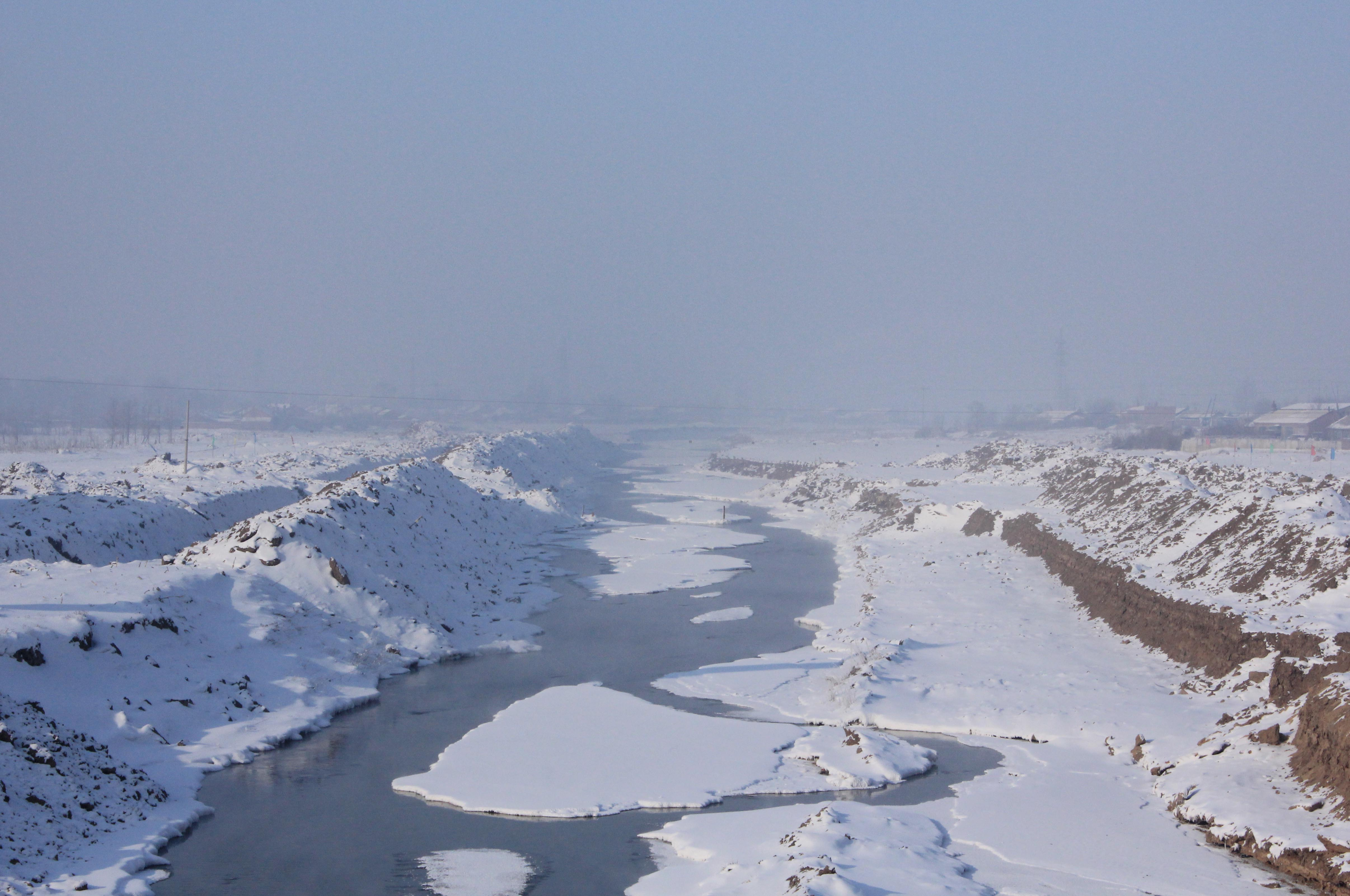 冬季的伊通河，摄于伊通镇北大桥，面向正西方